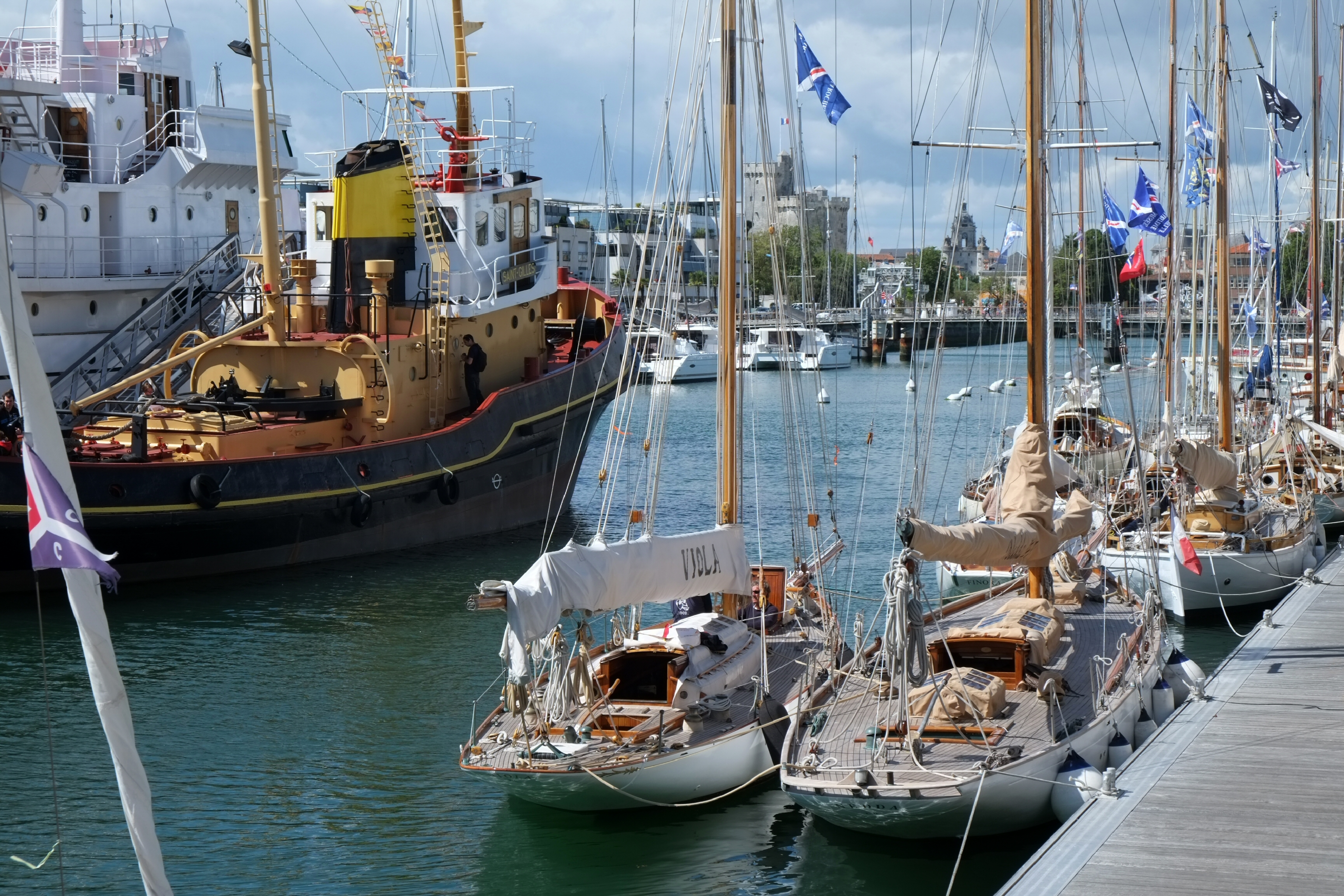 Musée Maritime de La Rochelle Charente-Maritime France